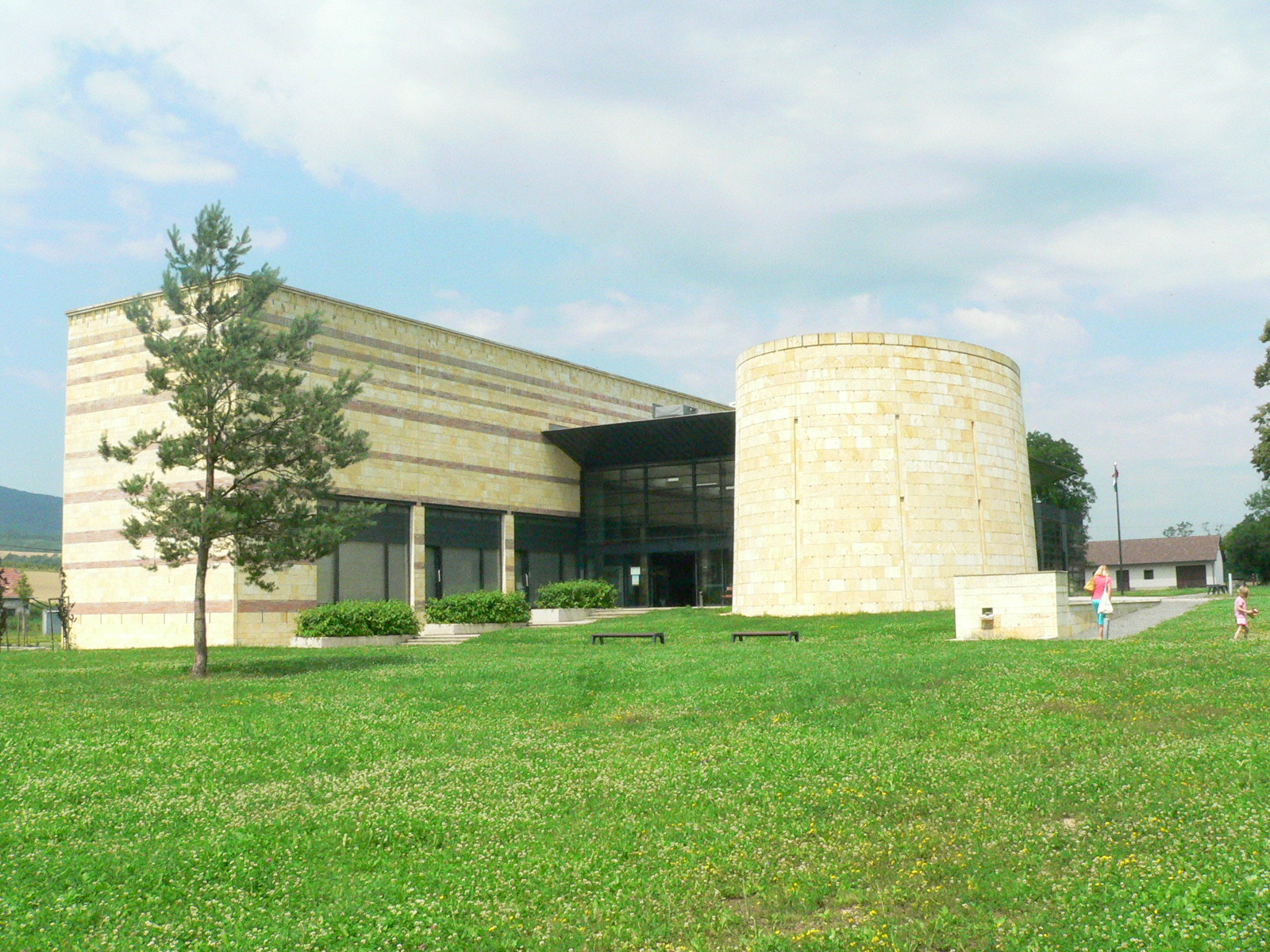 A Magyar Nyelv Múzeuma épülete bejárata Sátoraljaújhelyen